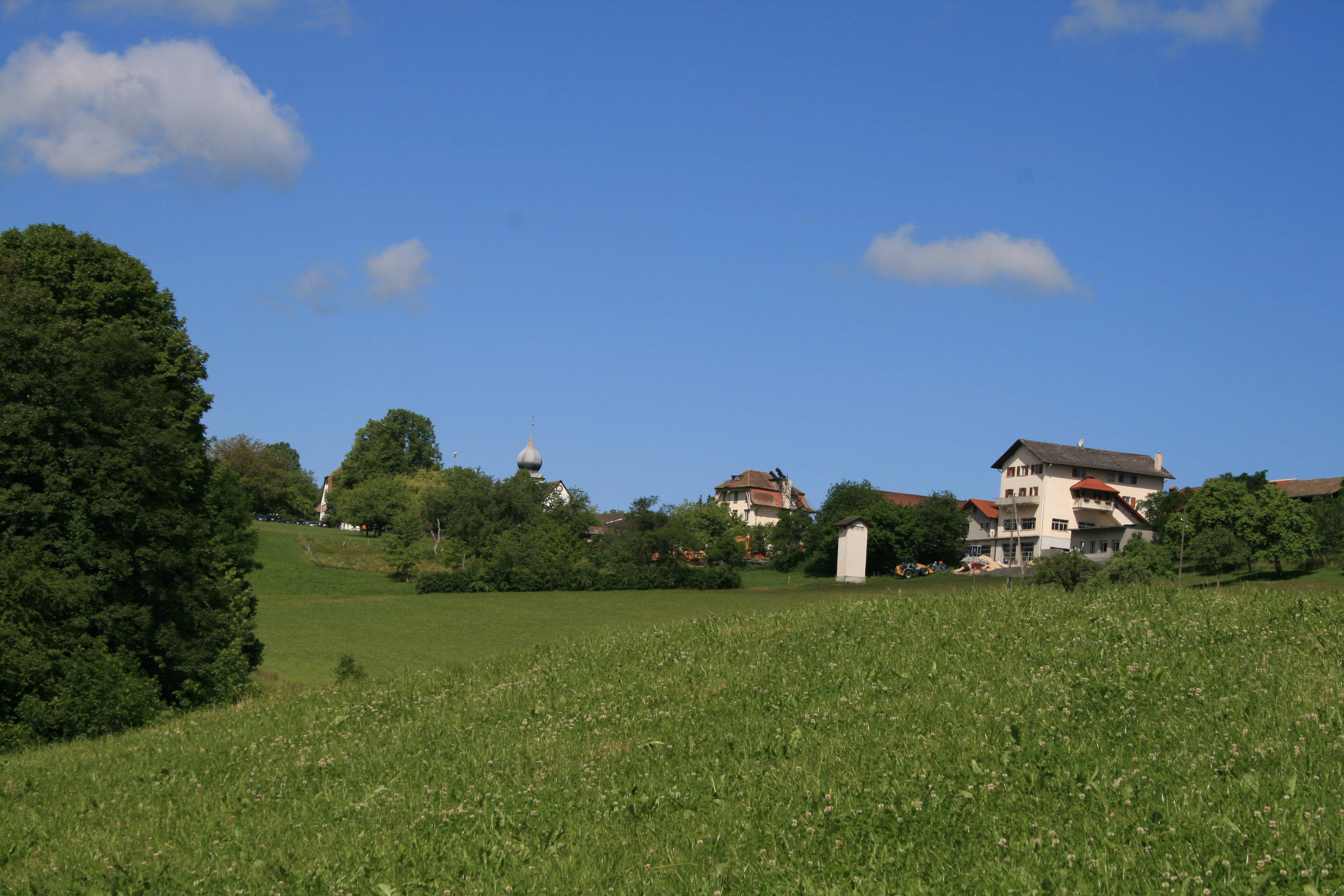 Sornetan BE, Schweiz